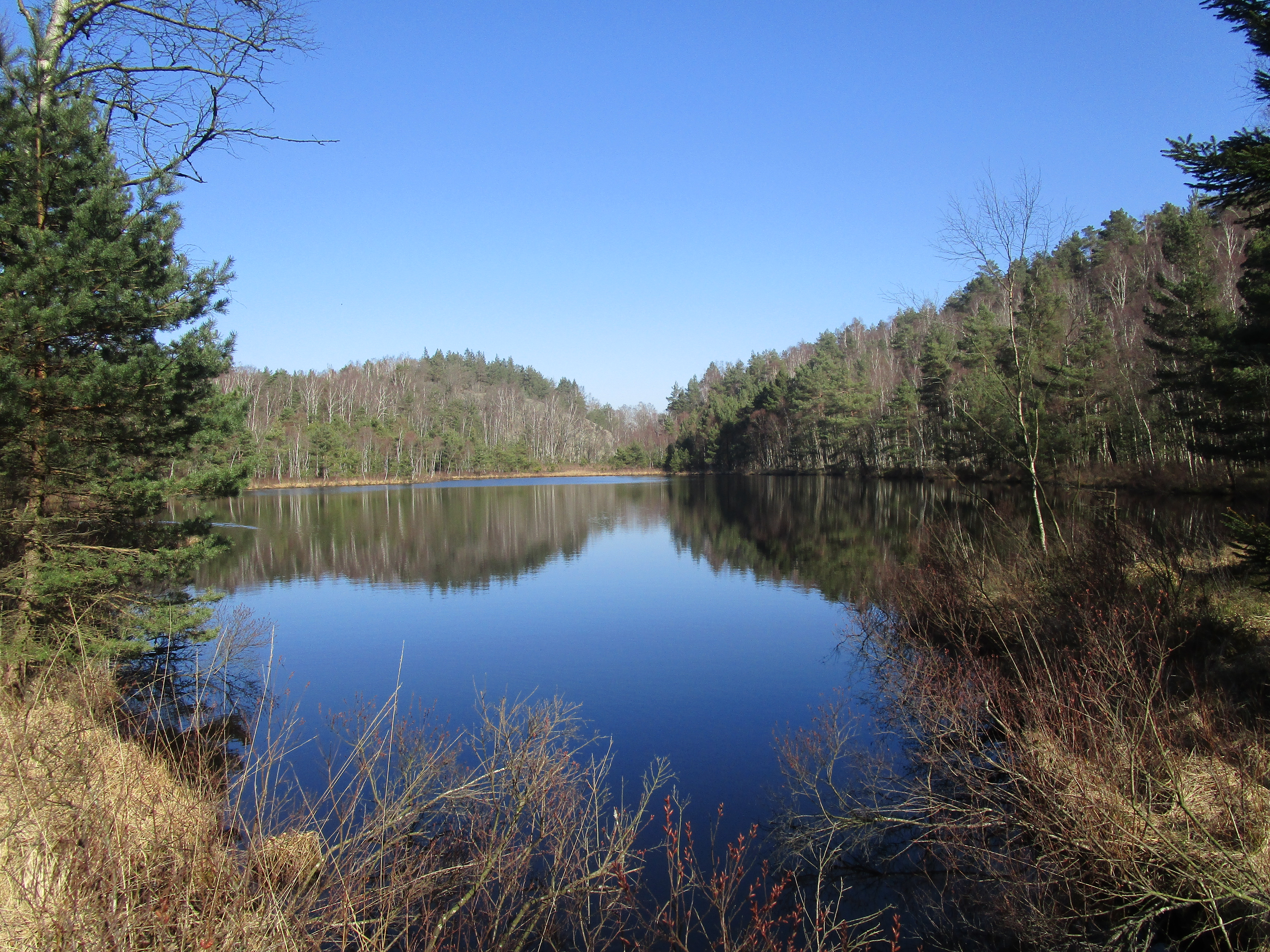 Lilla Björketjärnen från södra änden 27 mars 2020.